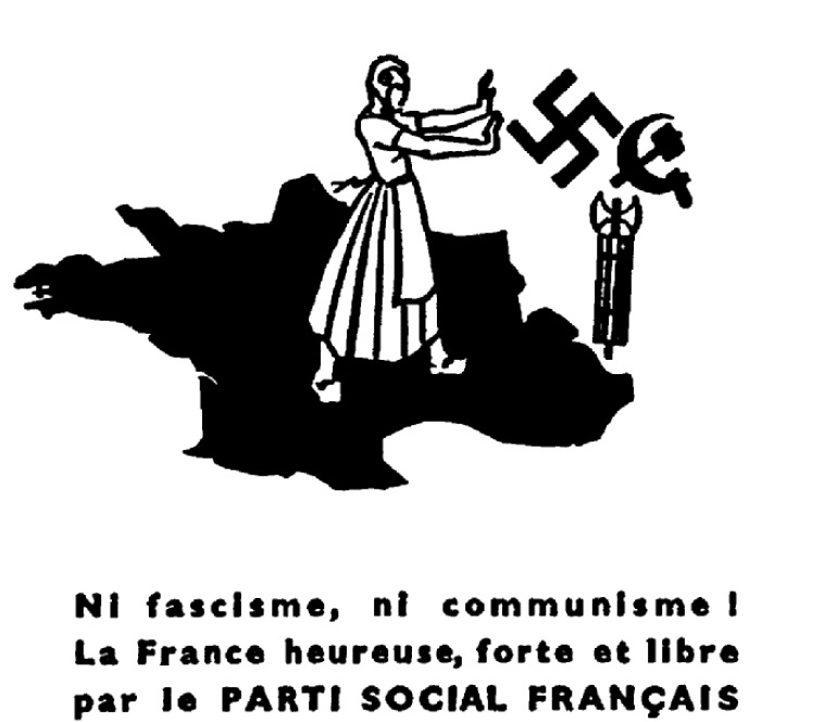 "Ni fascisme, ni communisme ! La France heureuse, forte et libre par le Parti social français".